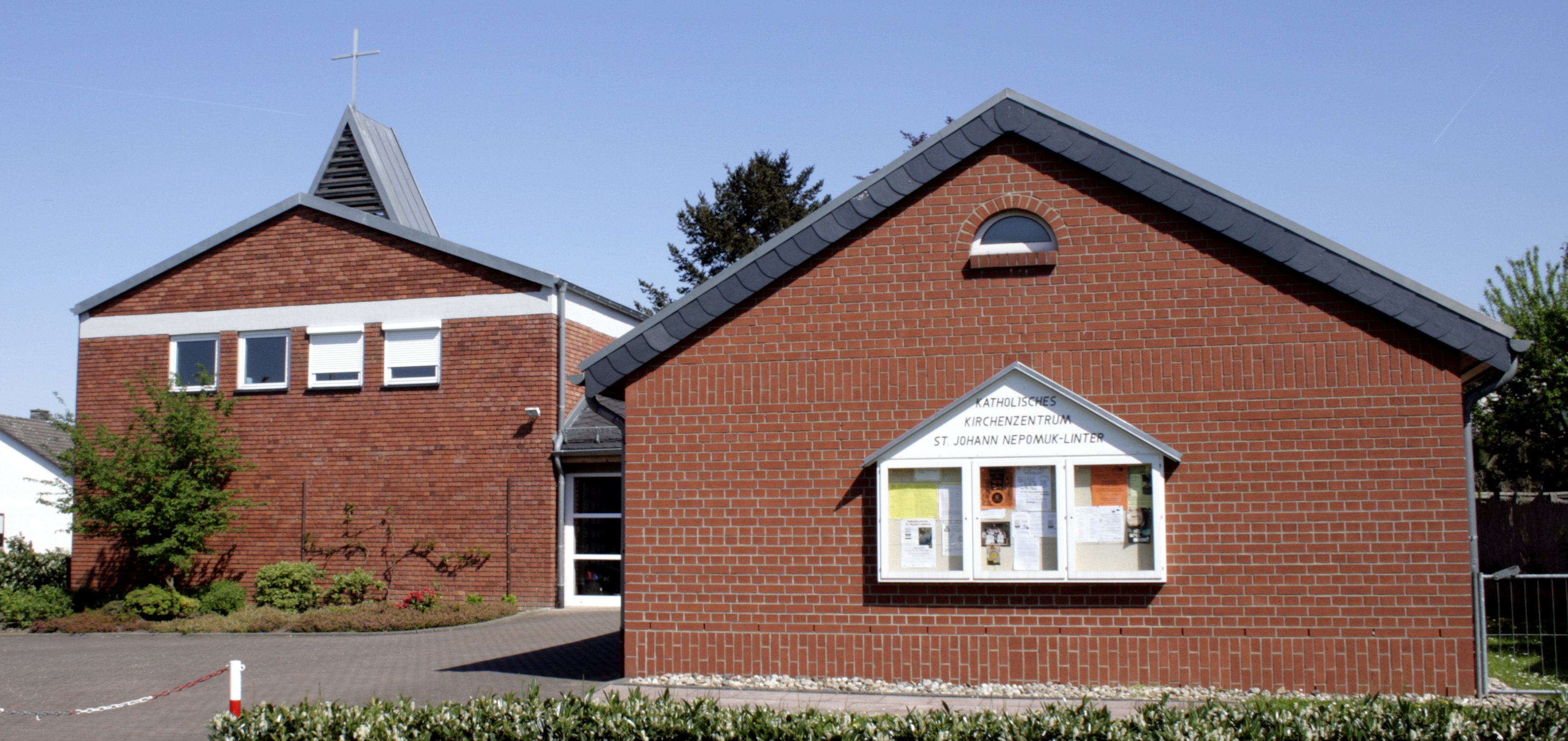 Katholische Kirche in Linter, Deutschland